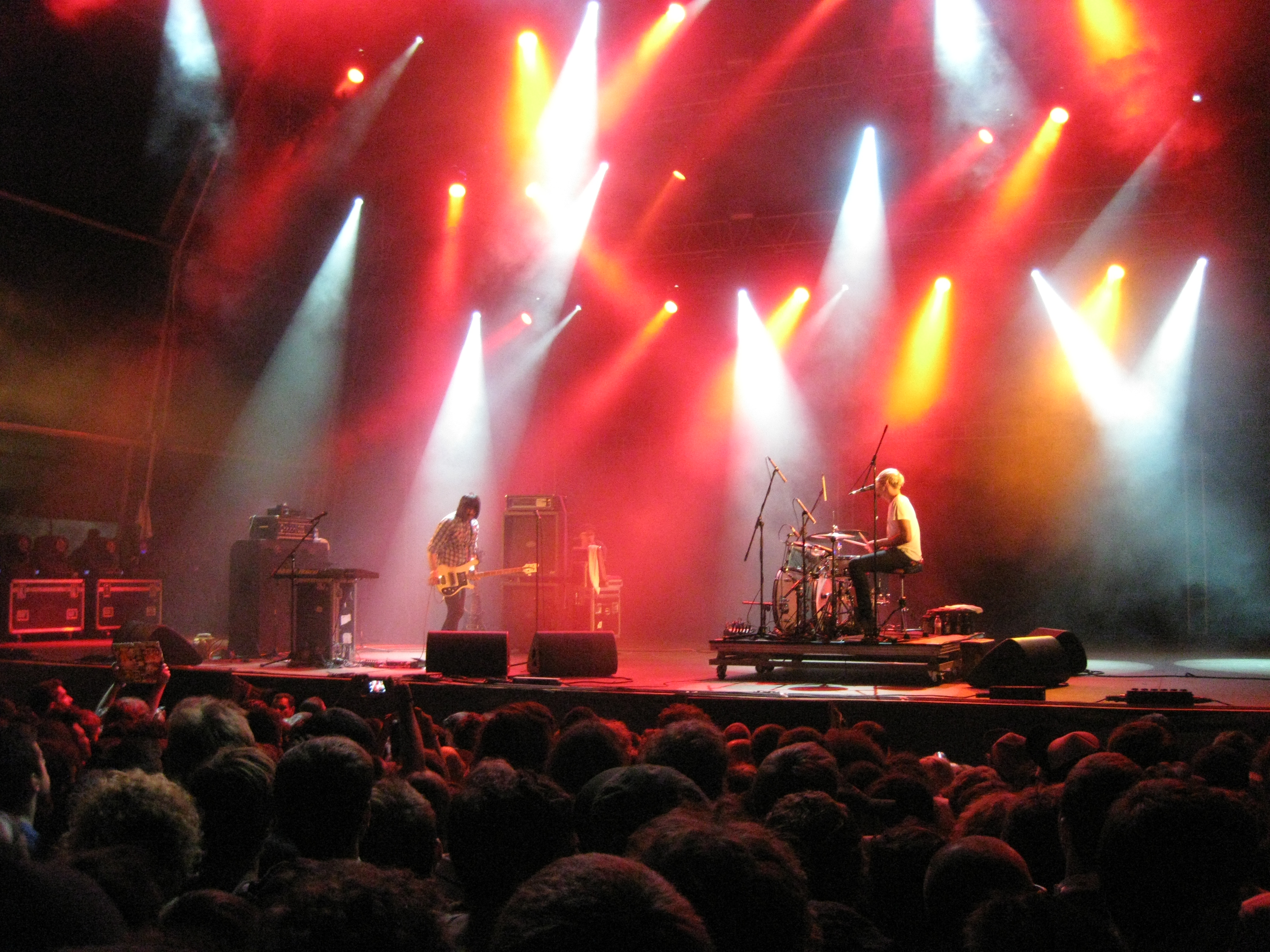 Death from Above 1979 no festival Paredes de Coura 2011.